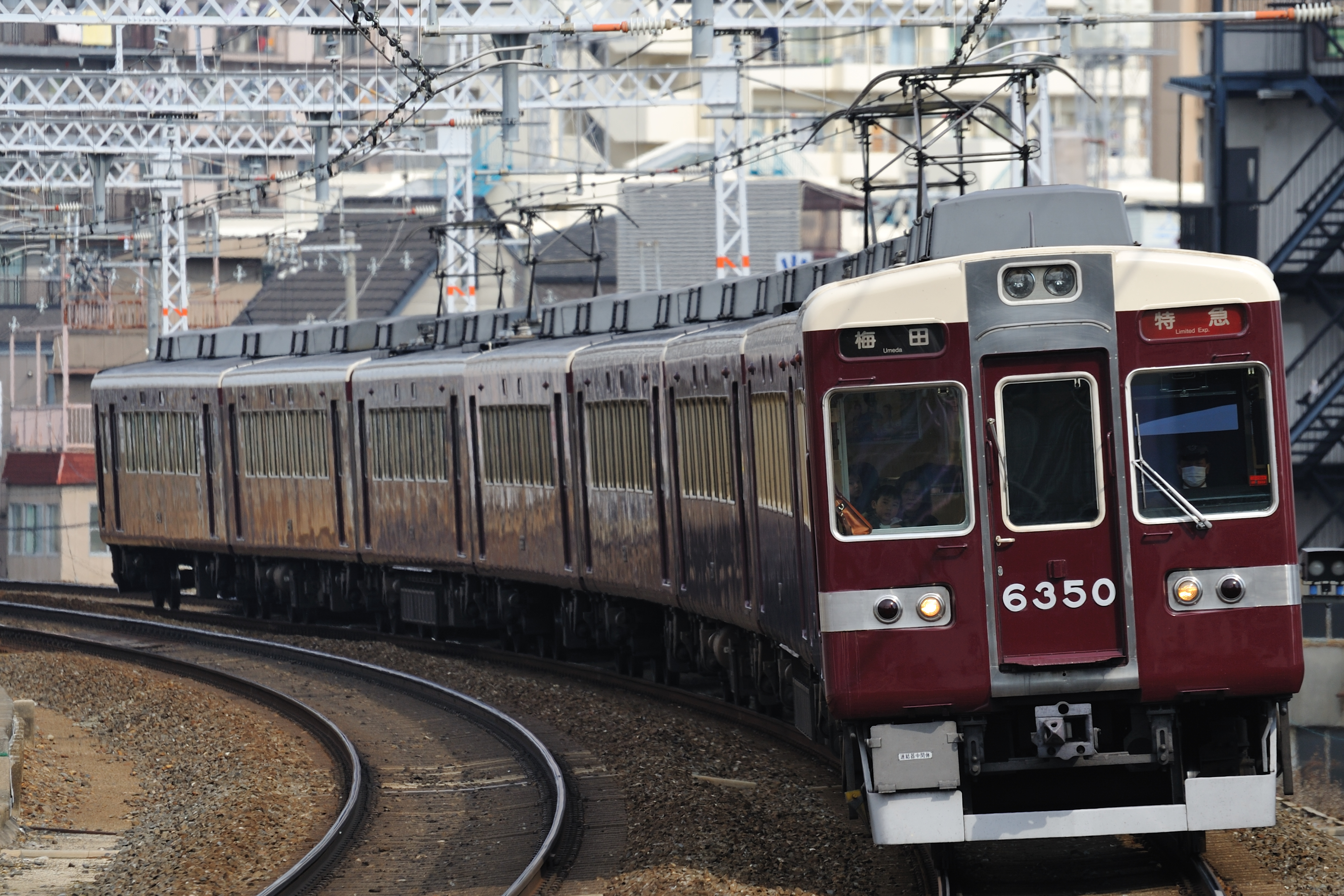 6350F Hankyu 6300 series